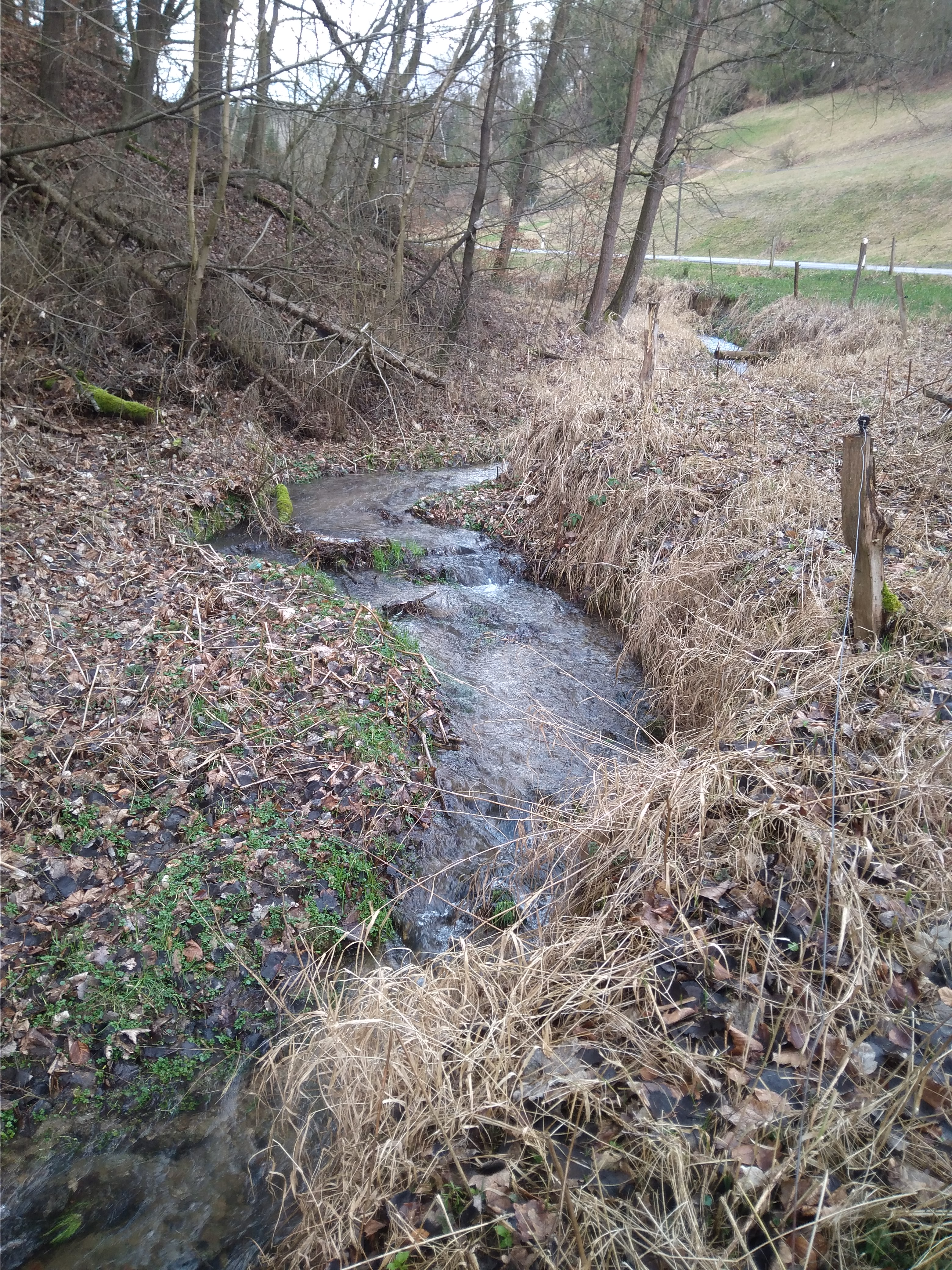 Ottendorfský potok jižně od Ottendorfu